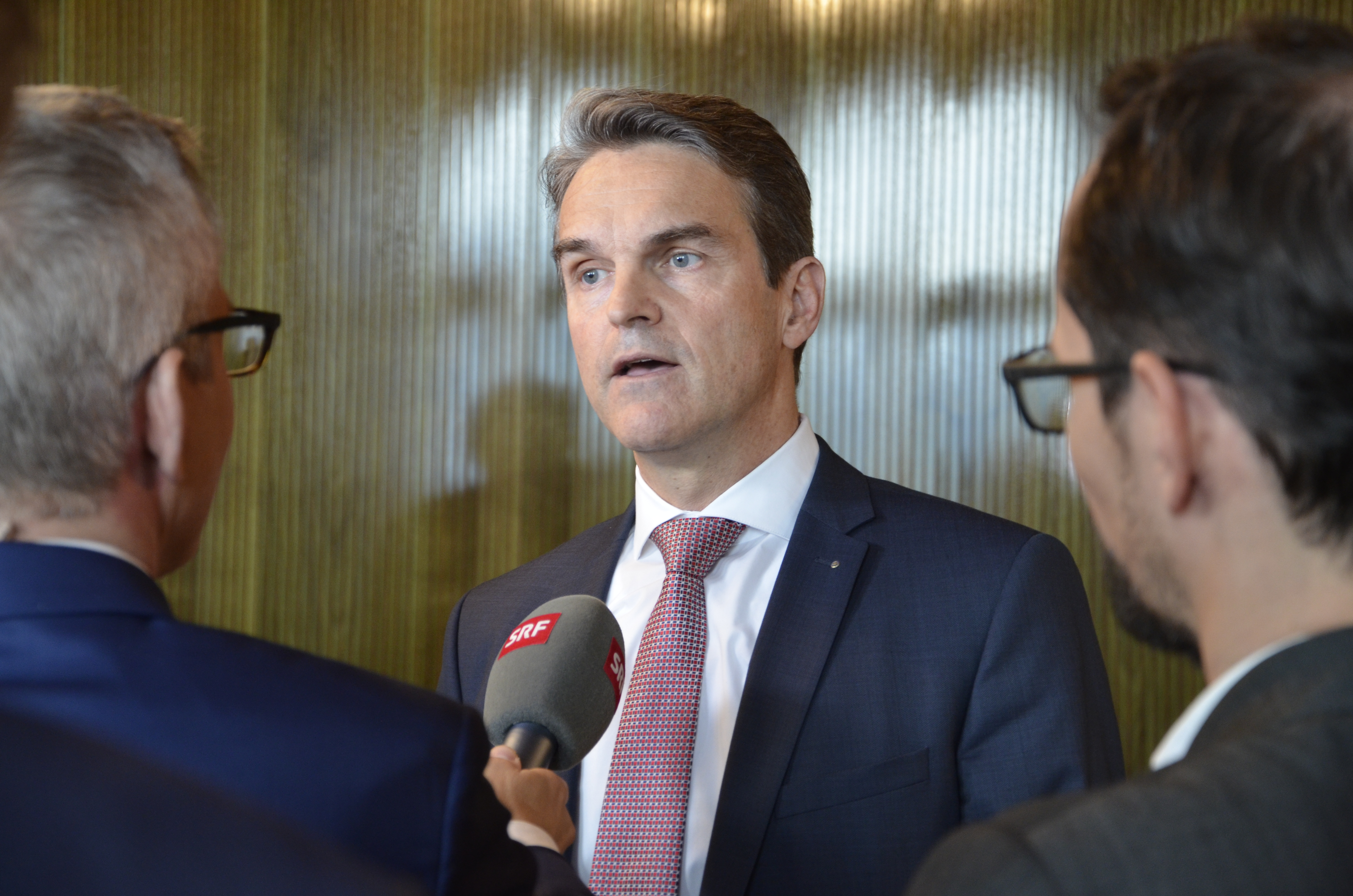 Schweizer Parlamentswahlen 2019: Wahltag im Bundeshaus, Beat Walti, Fraktionspräsident FDP wird interviewt.